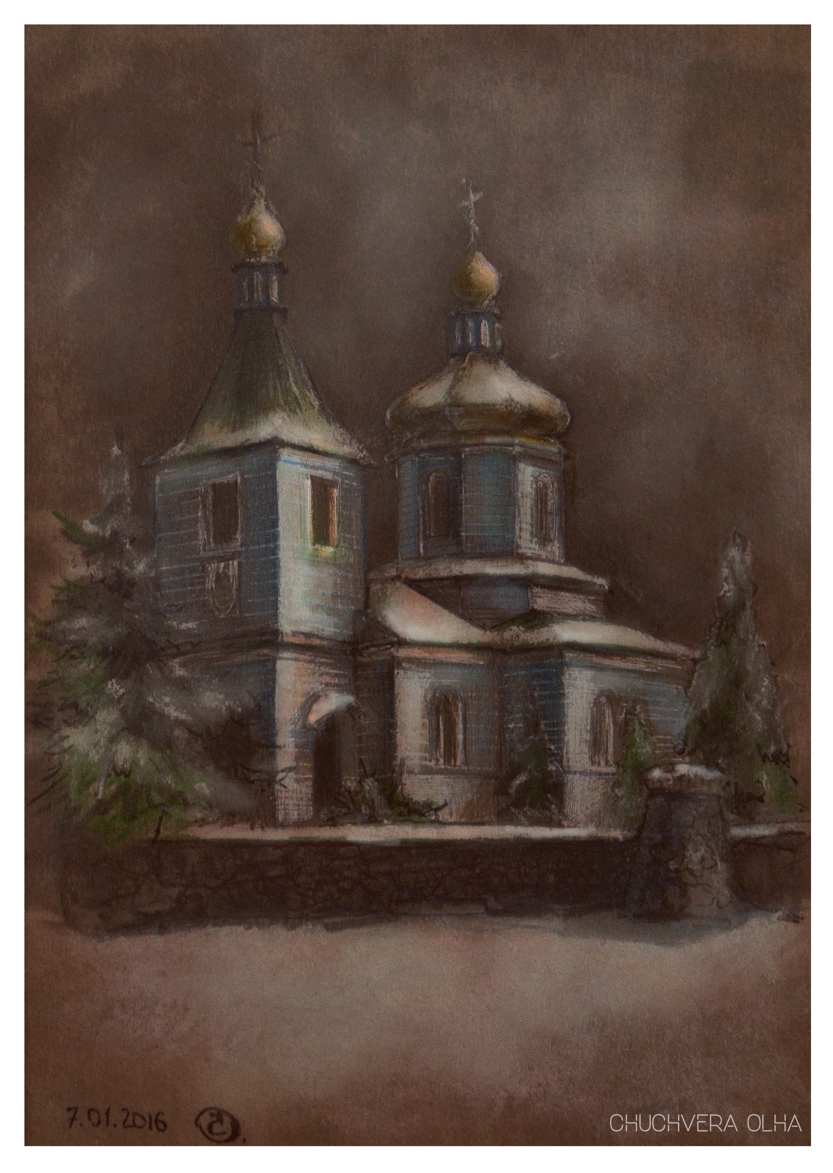 Вербка, Летичівський район